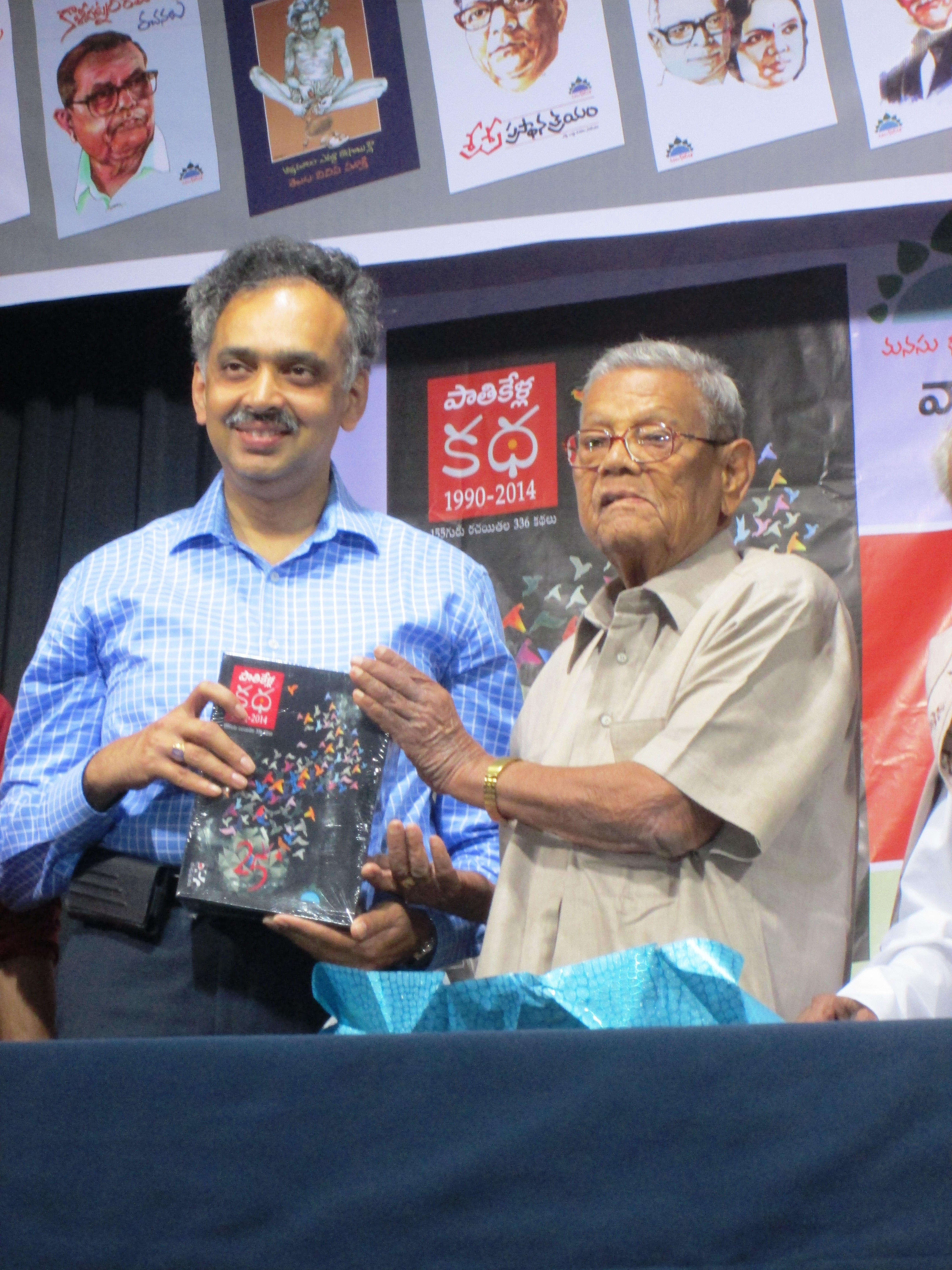 కాళీపట్నం రామారావు